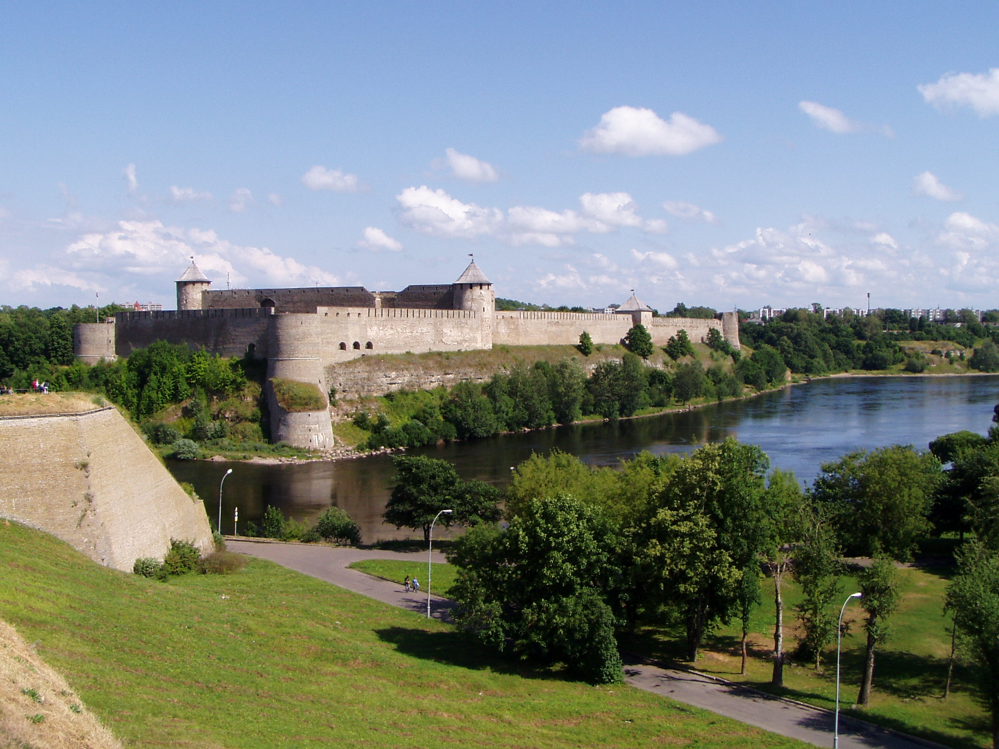 Iwangorod, widok na twierdze